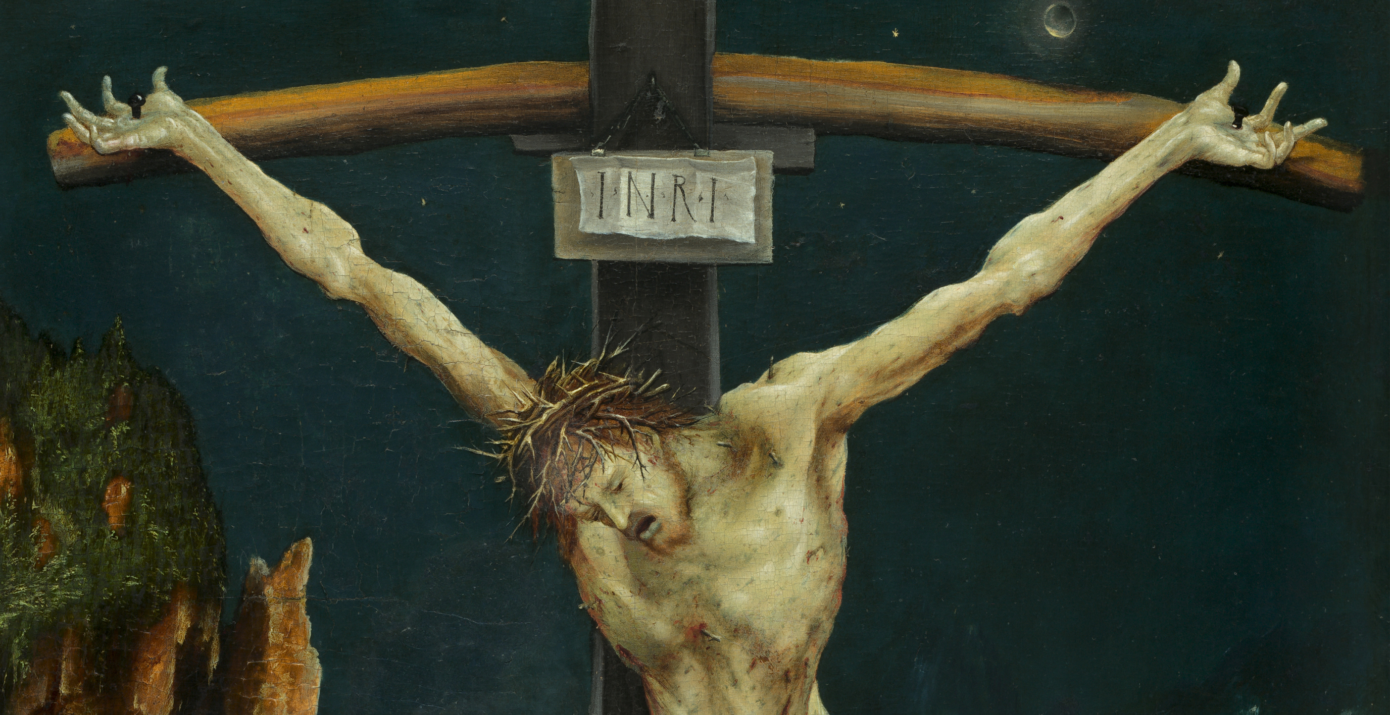 fragment uit een schilderij van Matthias Grunewald, ca. 1510